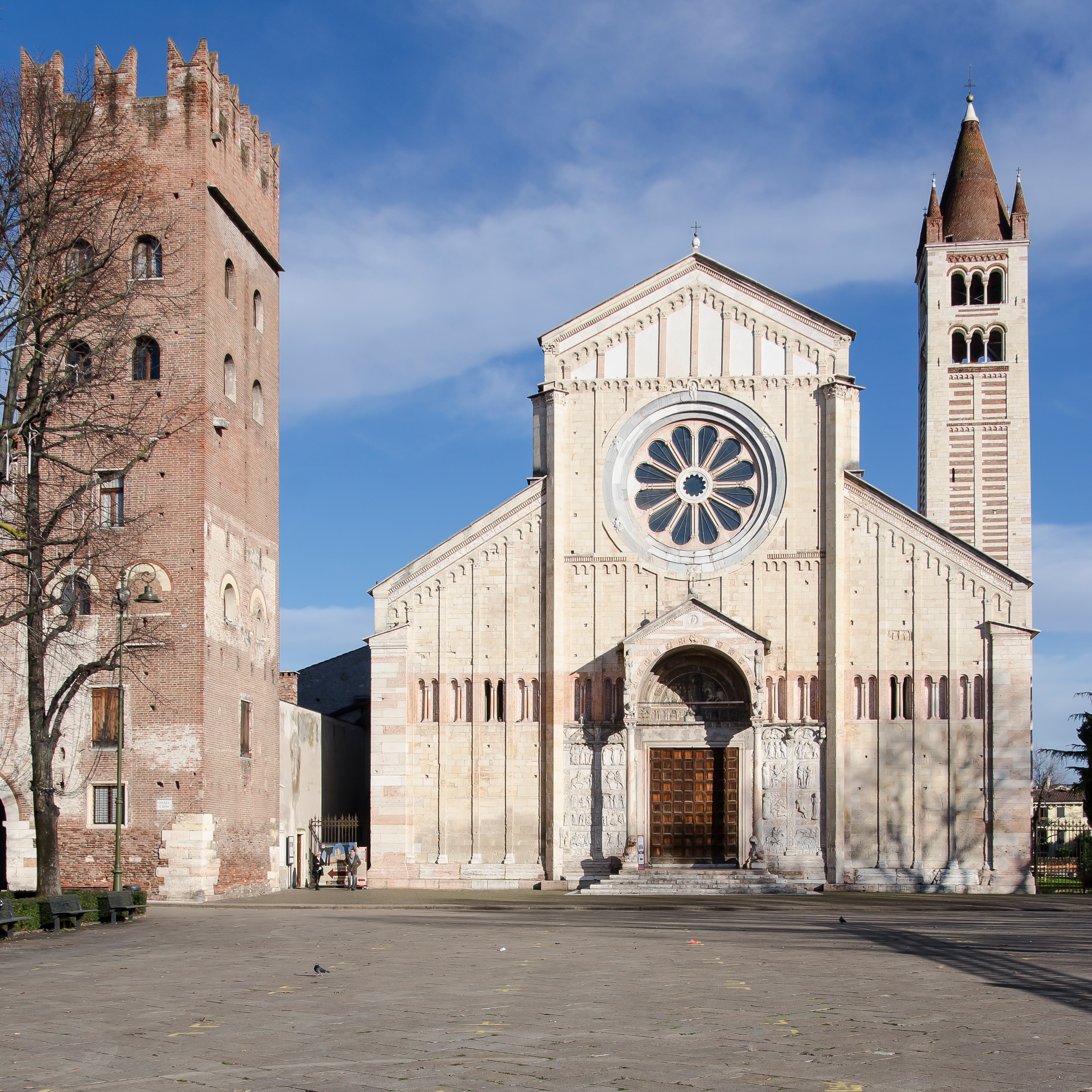 Vista da piazza San Zeno